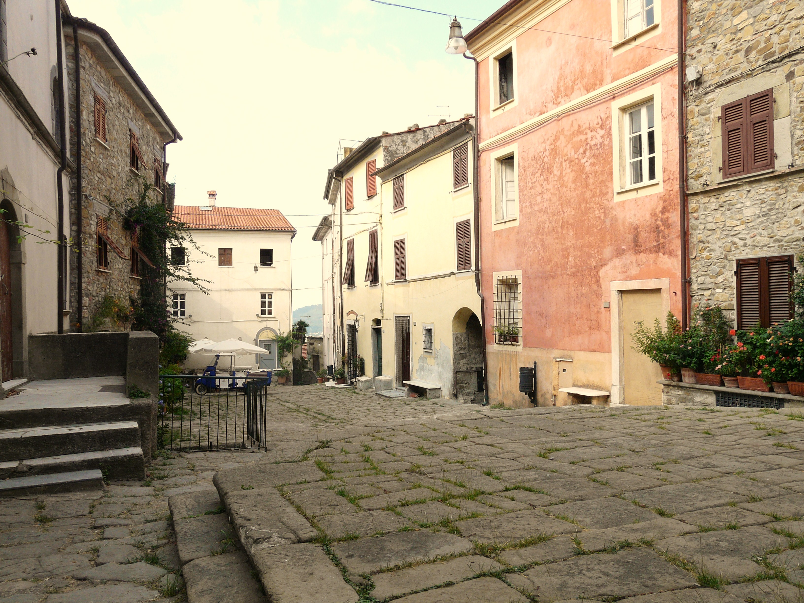 Nicola, Ortonovo, Liguria, Italia